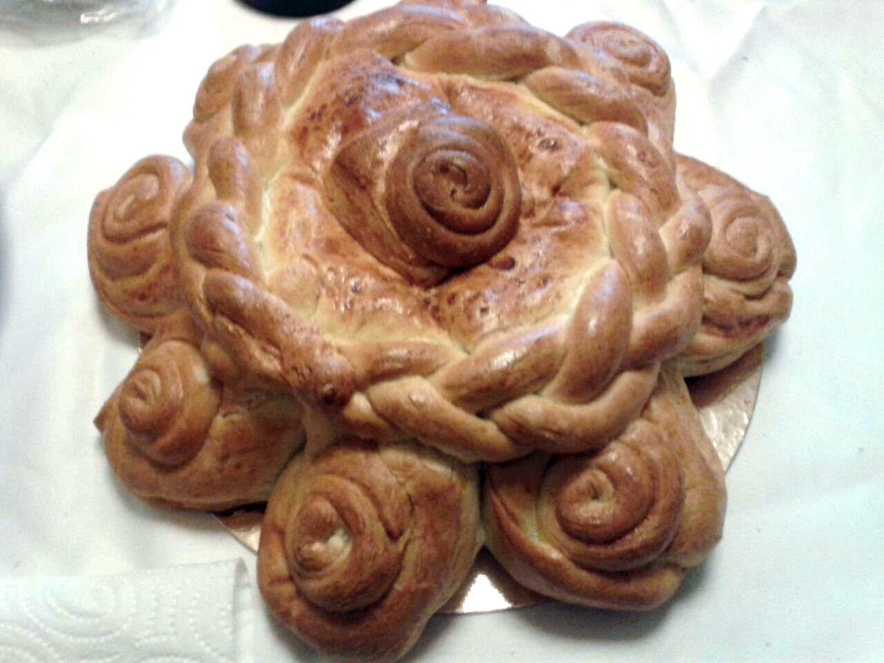 Diese Mutschel hat einen Durchmesser von ca. 40 cm.